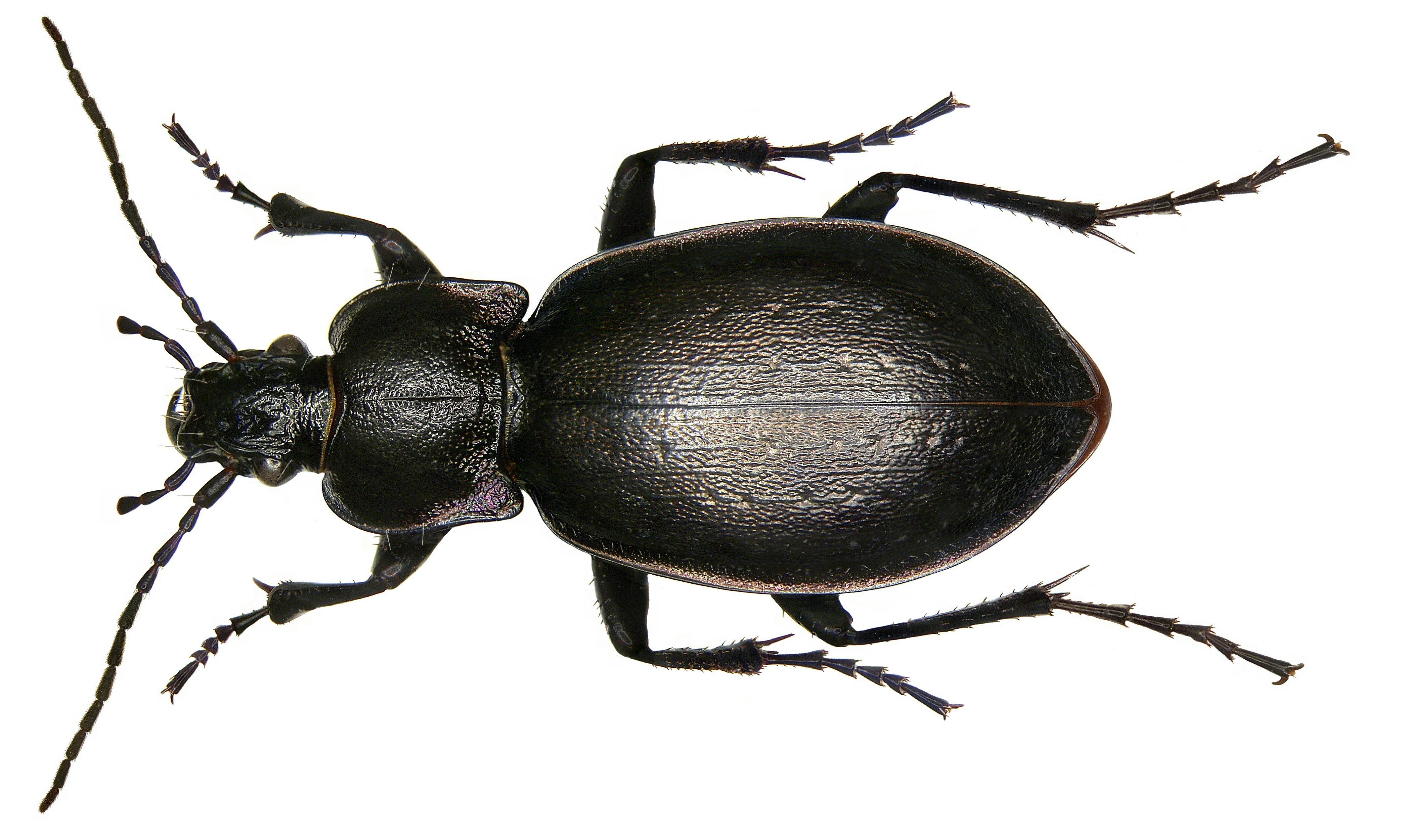 Familie: Carabidae Grösse: 18-28 mm Verbreitung: Europa, im Osten bis Moskau Ökologie: eurytop Fundort: Germania, Oberfranken, Selbitz leg.det. U.Schmidt, 2005 Foto: U.Schmidt, 2008